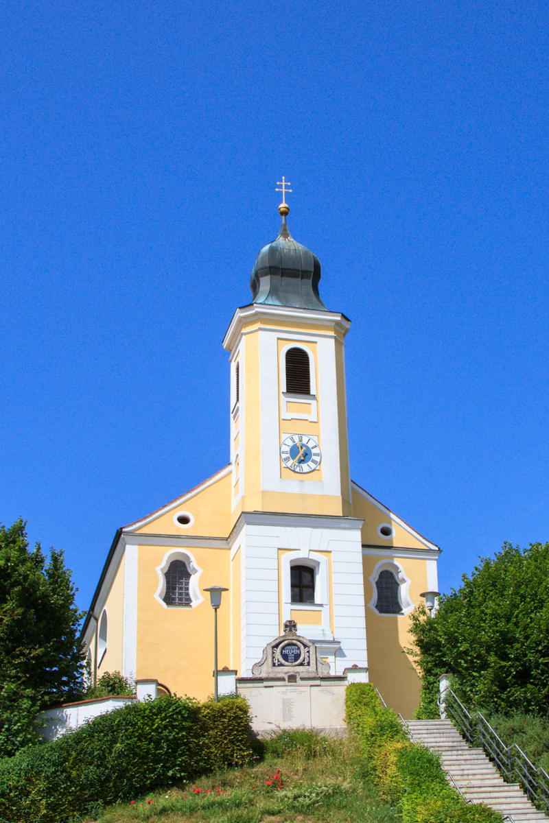 Katholische Pfarrkirche Mariä Lichtmeß; Saalkirche mit Satteldach und eingezogenem, halbkreisförmig geschlossenem Chor, 1756, Ostturm mit Glockenhaube, nach 1778; mit Ausstattung; Kriegerdenkmal für die Gefallenen beider Weltkriege, Inschrifttafel, darüber volutengerahmtes Relieffeld, um 1920, später mit Gefallenen des II. Weltkriegs ergänzt.This is a photograph of an architectural monument.